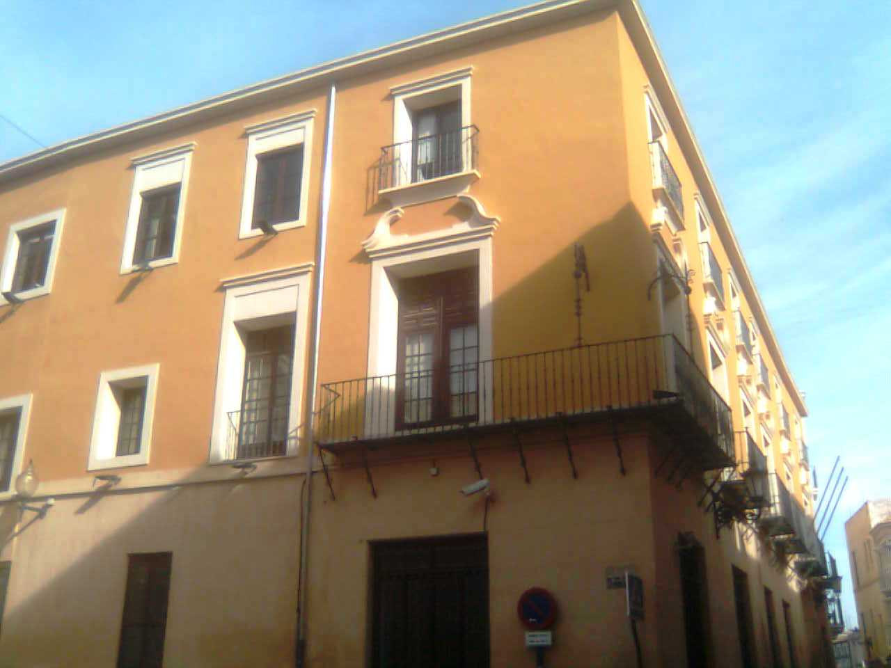 Palacio Portillo, sede central de la Caja Rural Central, Orihuela